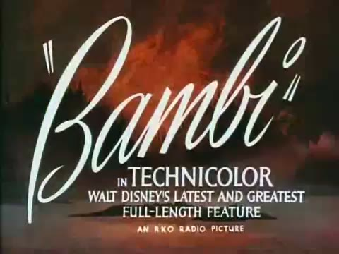 Imatges del tràiler de la pel·lícula "Bambi". Els tràilers de les pel·lícules publicats abans de 1964 als Estats Units es troben en domini públic